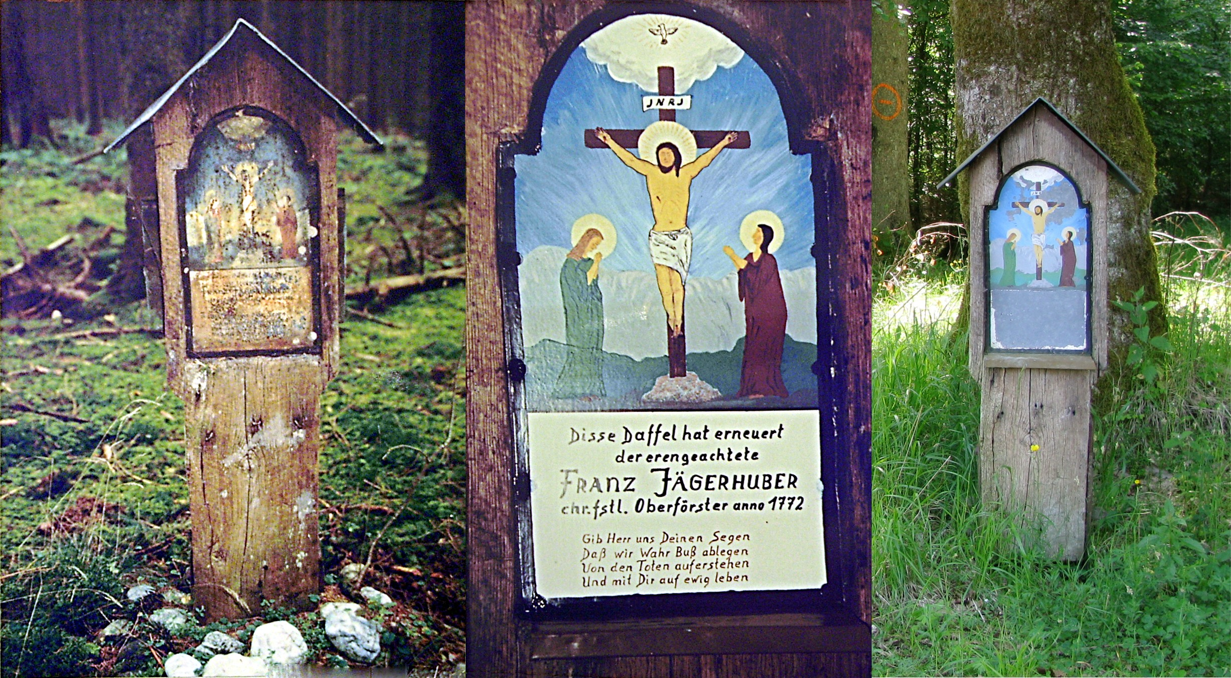 Grüne Marter im Forstenrieder Park. Ansicht von um das Jahr 2000 (links) und von 2010 (rechts), an einem anderen Standort.